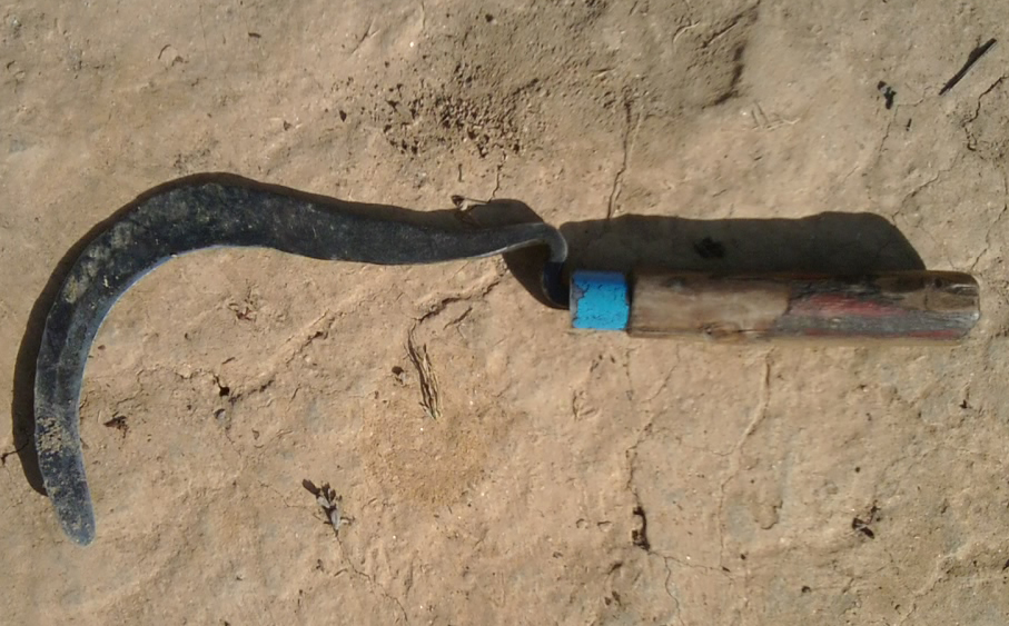 नेपाली: हैंस्या,खुर्पा